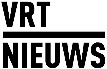 Nieuwe logo van 'VRT Nieuws' per 25 maart 2013